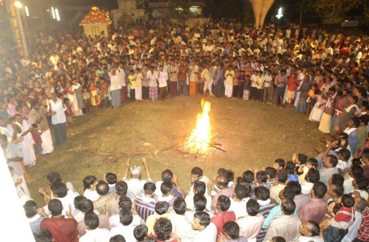 കുടംപൂജകളി